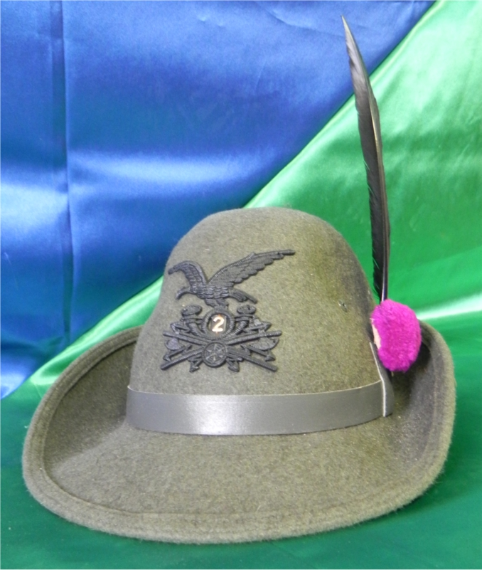 Cappello Alpino Graduati Truppa